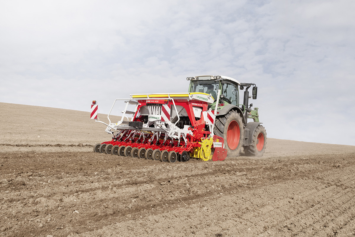 Pneumatische Sämaschinen AEROSEM von PÖTTINGER